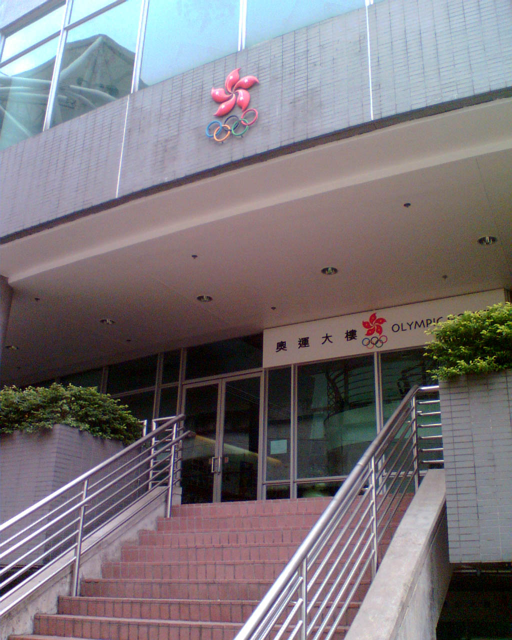 香港奧運大樓入口